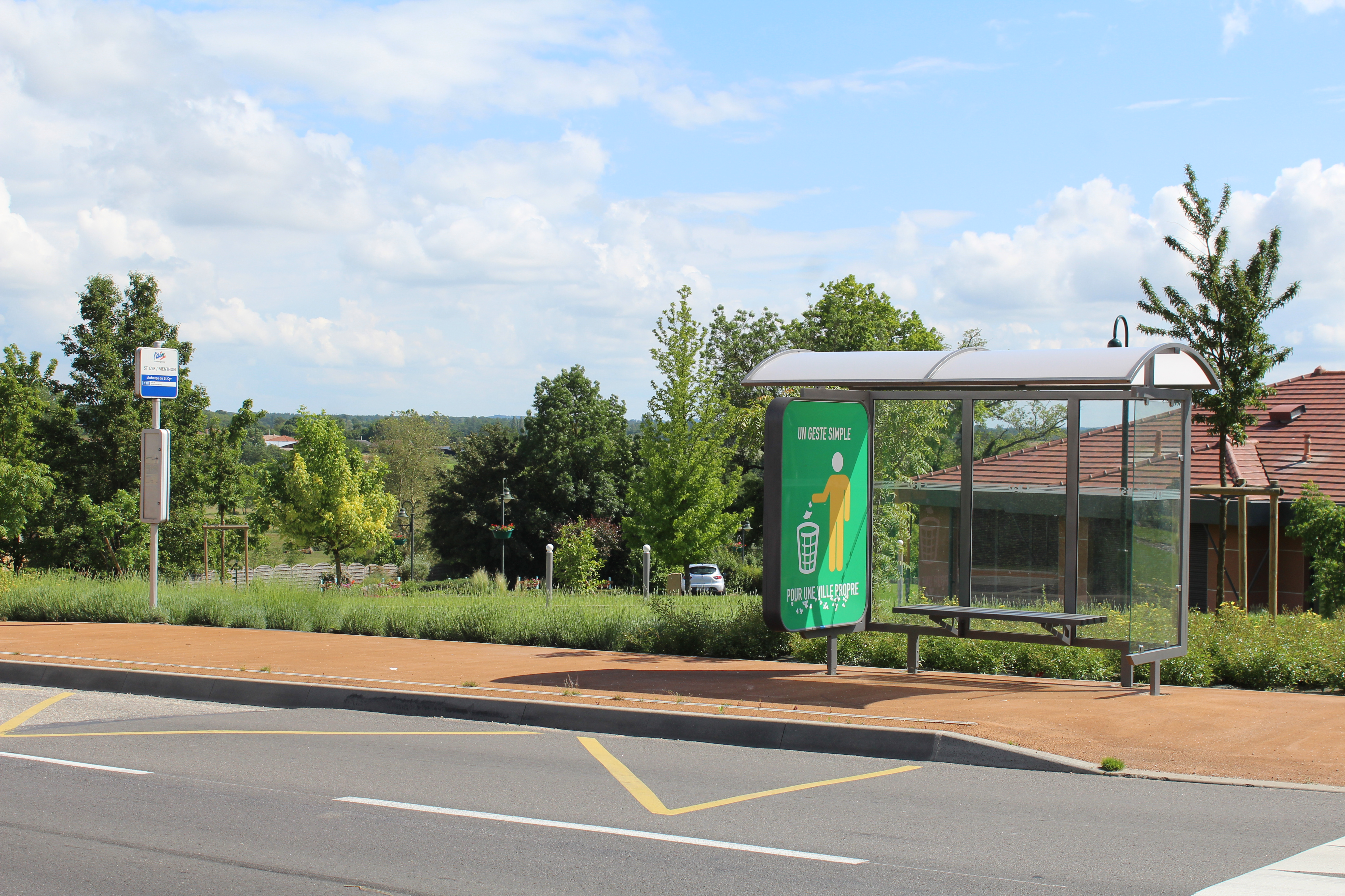 Arrêt Auberge à Saint-Cyr-sur-Menthon en direction de Bourg-en-Bresse.